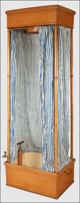 Manoir d'Erddig. Douche portative avec son receveur, son réservoir haut et sa pompe manuelle Année1800.